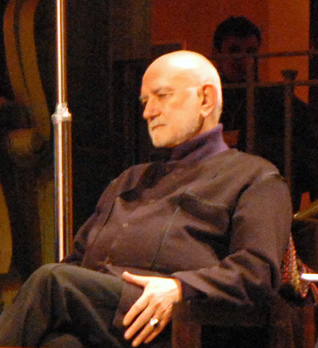 Débat sur « la transmission » du 28 janvier 2009. Les conversations essentielles sur le thème de la relation à l'autre. Henri Gougaud. Exposition « 6 milliards d'autres » au Grand Palais.